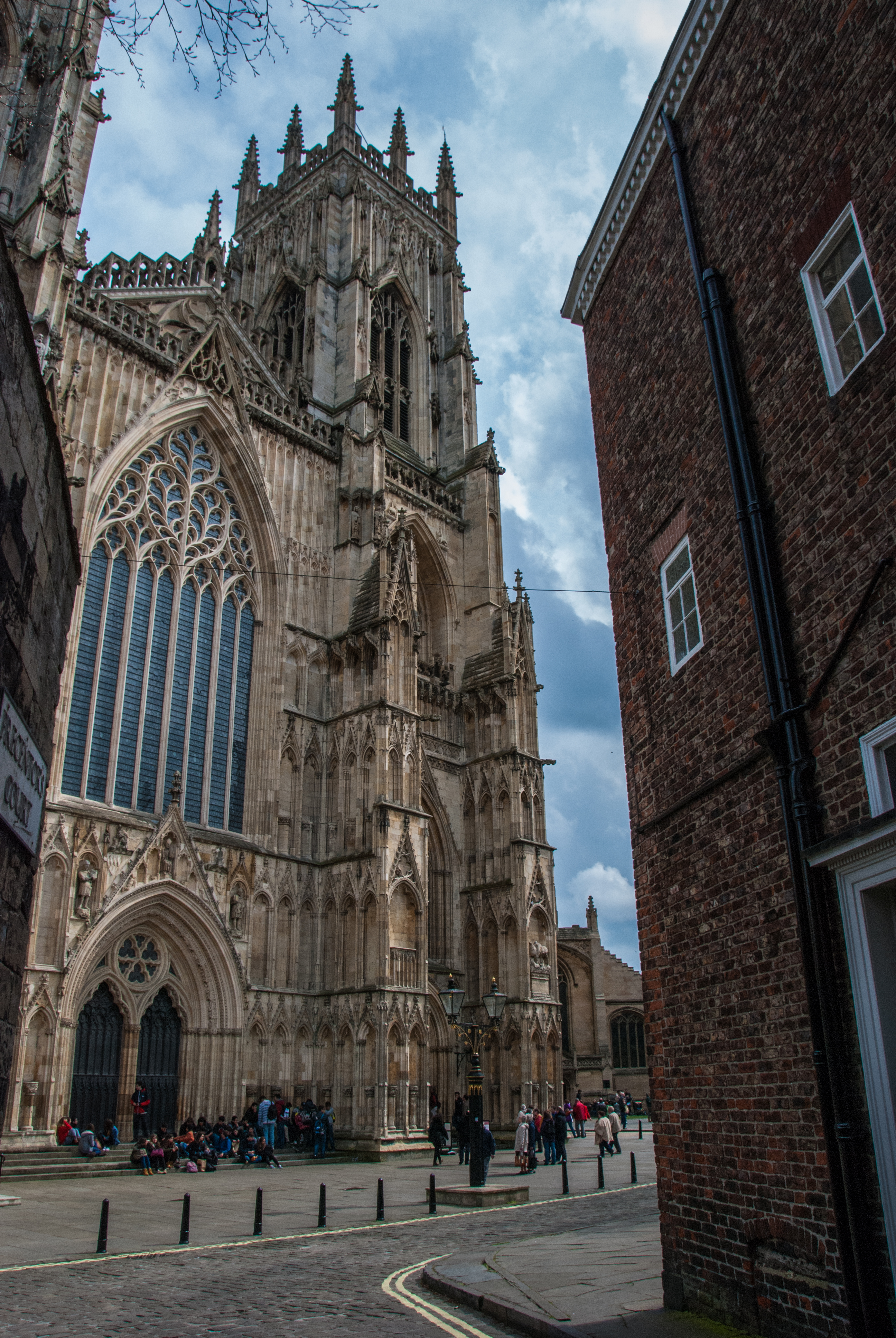 York Minster, York